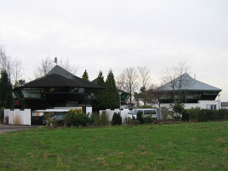 Stelzenhaus-Siedlung in Pulheim-Sinnersdorf